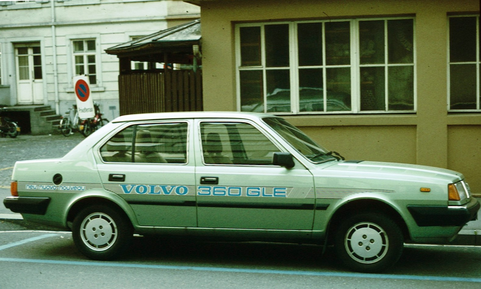 Volve 360 GLE in Switzerland